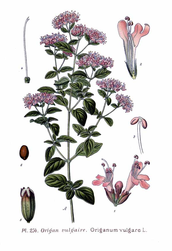 Origanum vulgare L.